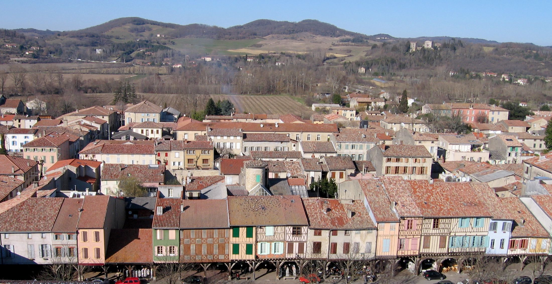 Mirepoix (Ariège, France) - Vue de la ville depuis le clocher de la cathédrale.